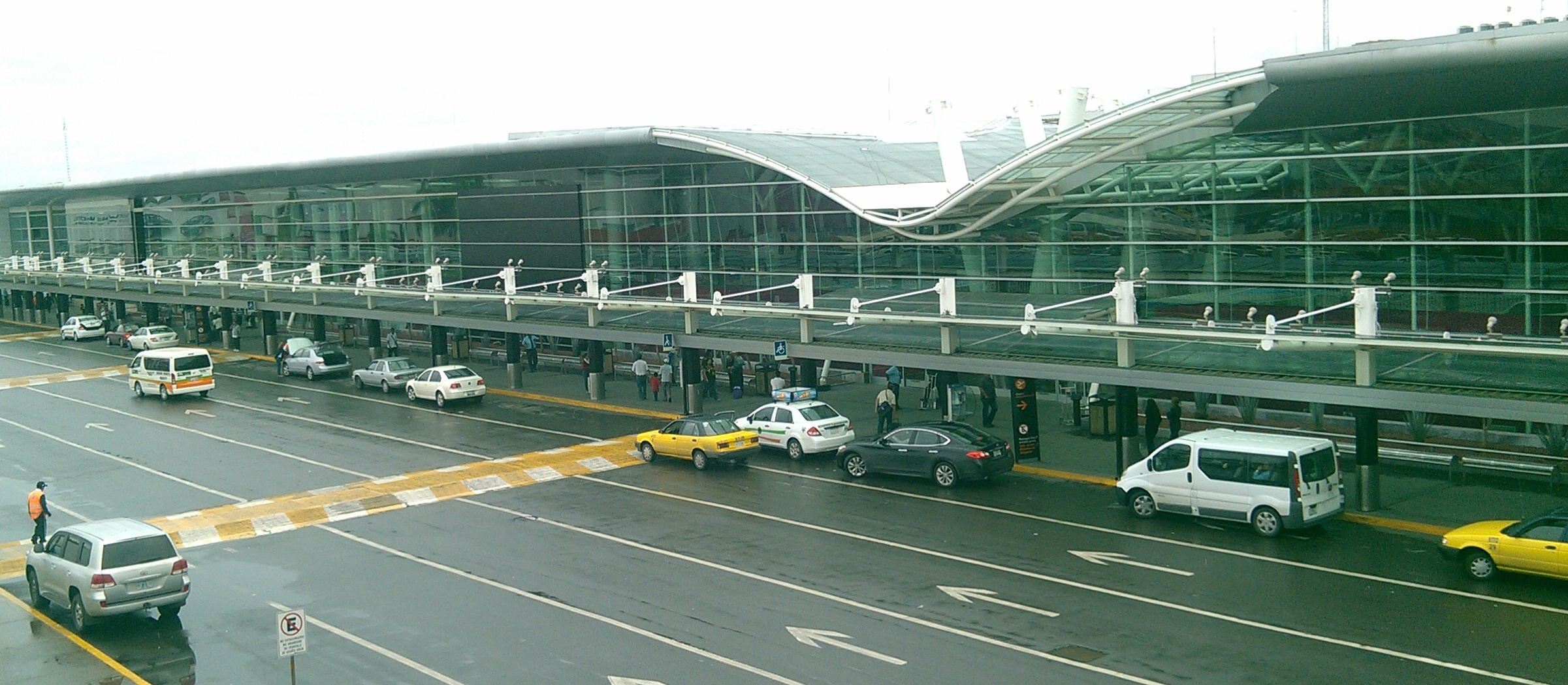 Aeropuerto Internacional de Guadalajara